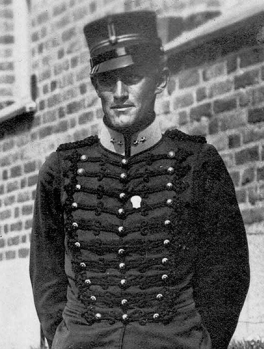 Georg de Laval